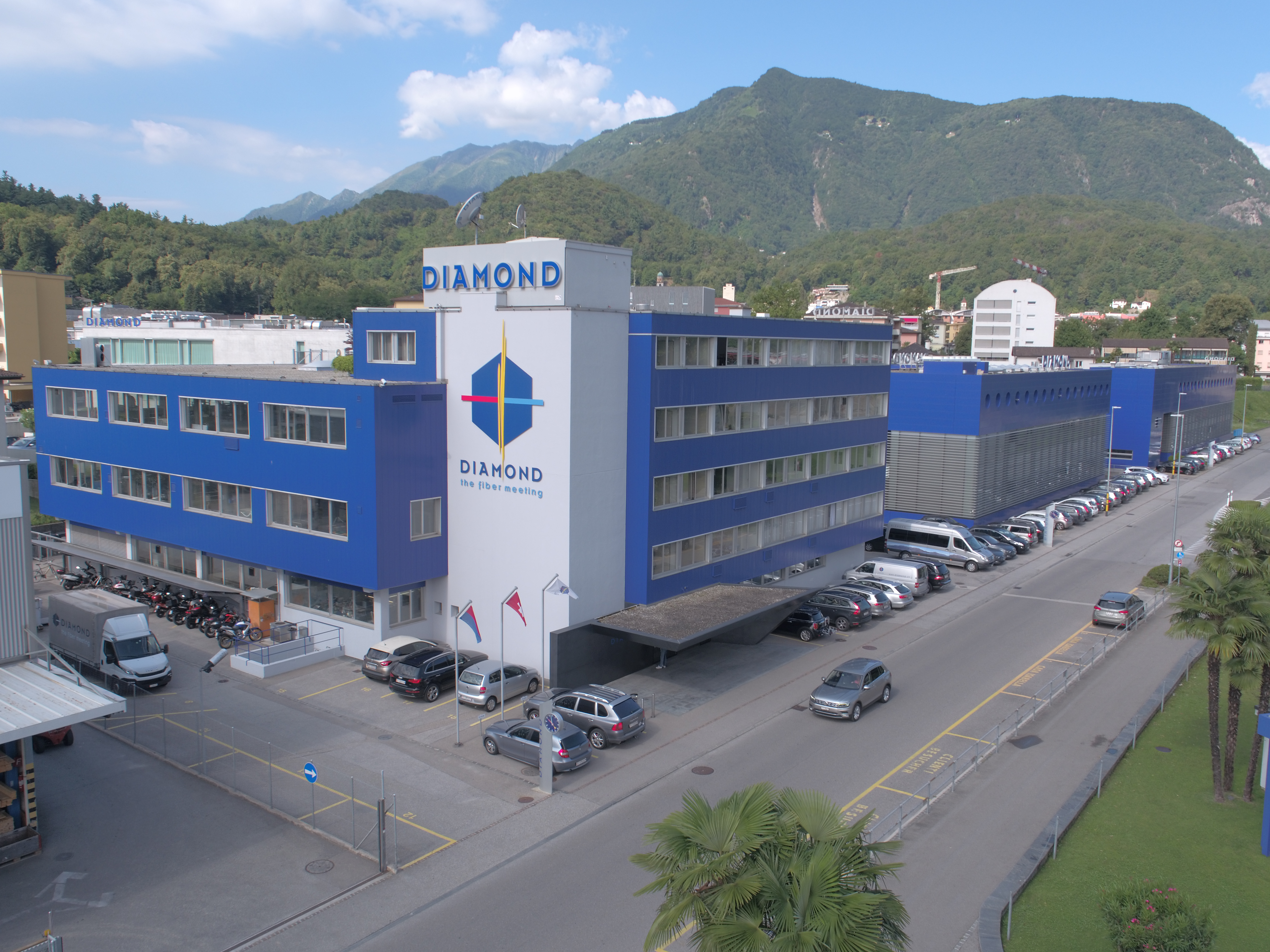 Hauptsitz